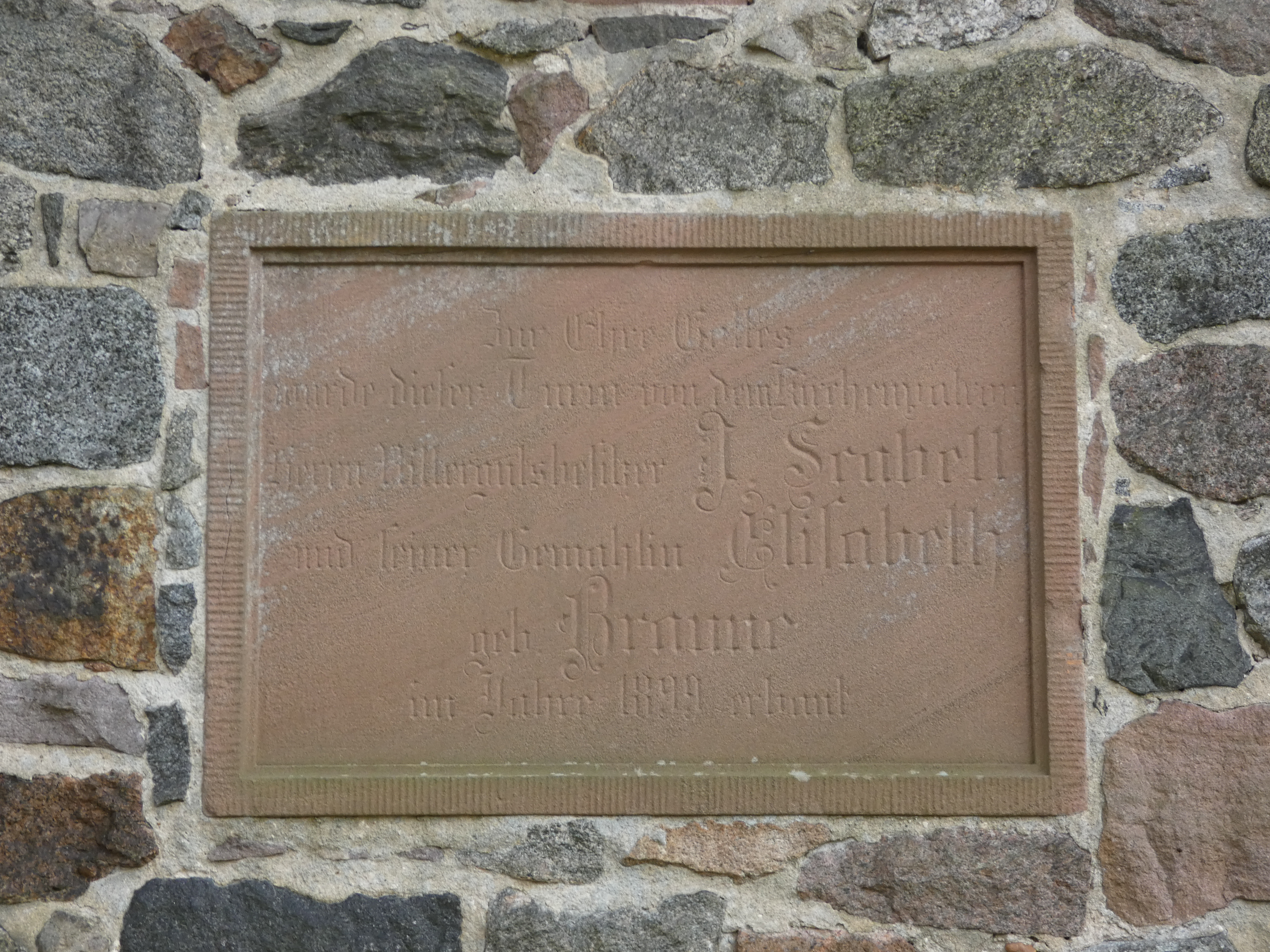 St. Timothei in Klein Lübars, Inschriftenstein zum Turmbau